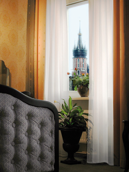 widok z pokoju Grand Hotel Kraków